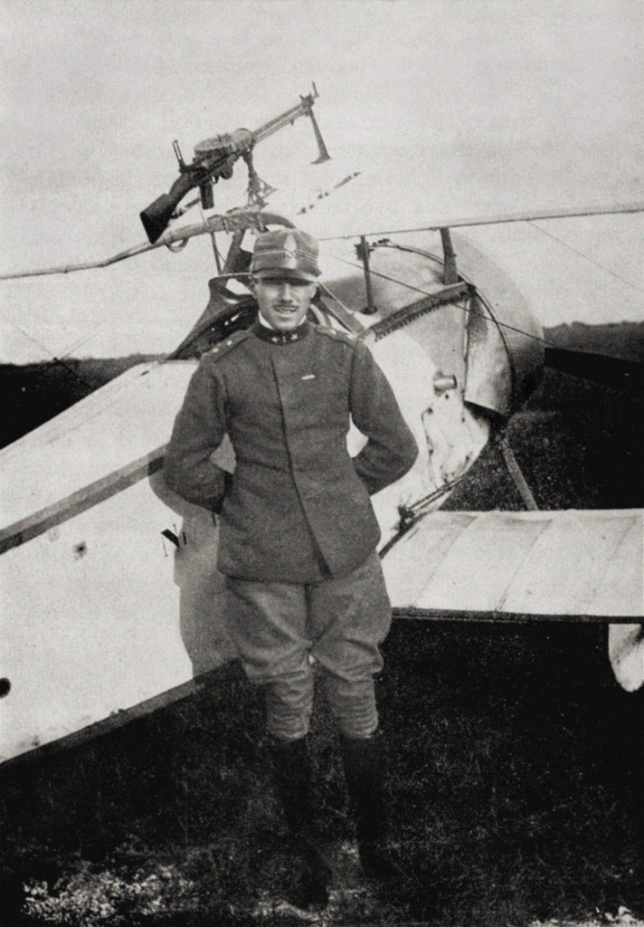 Francesco Baracca (1888-1918) olasz ászpilóta